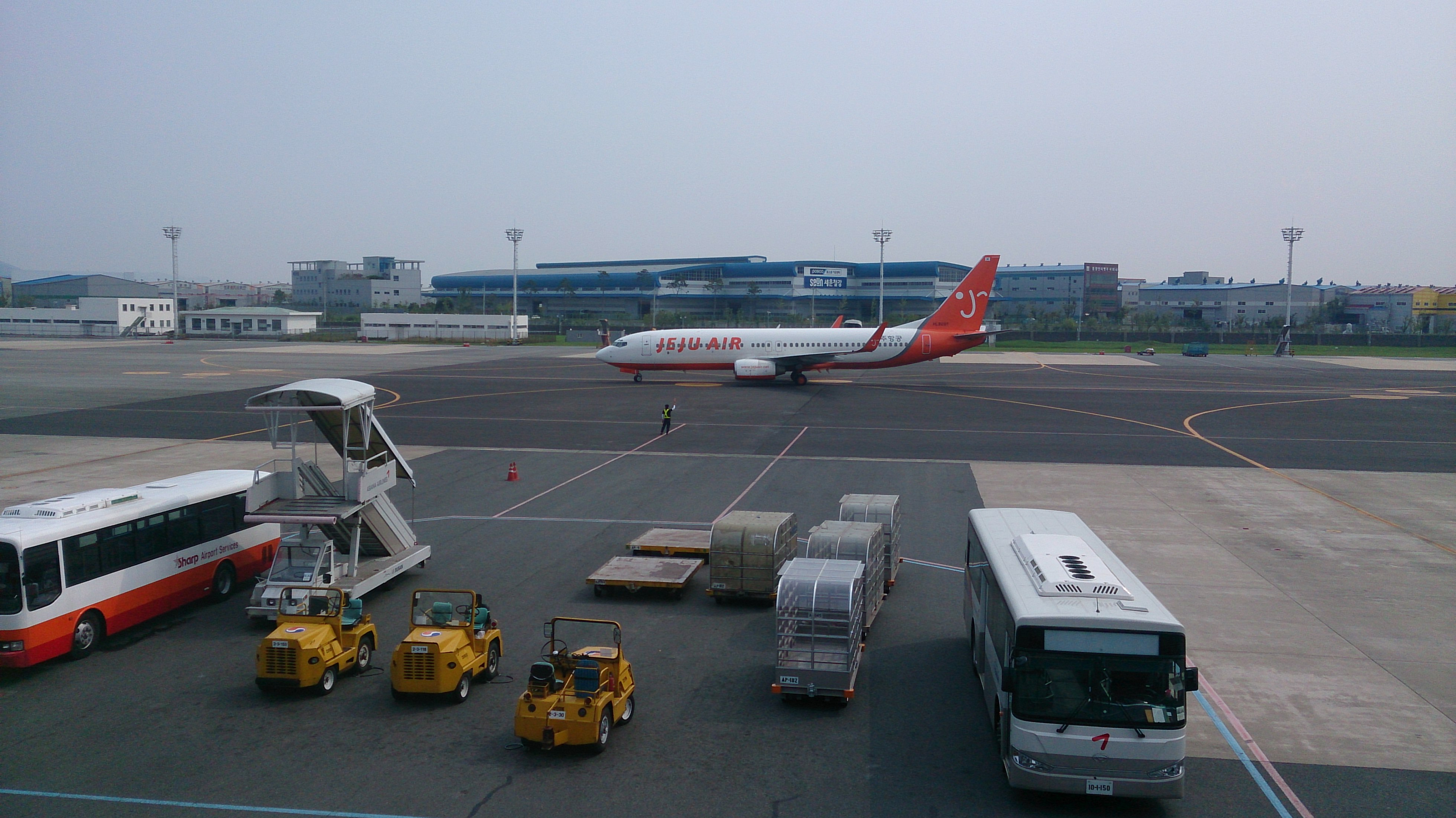 Jeju Air Aeroplane